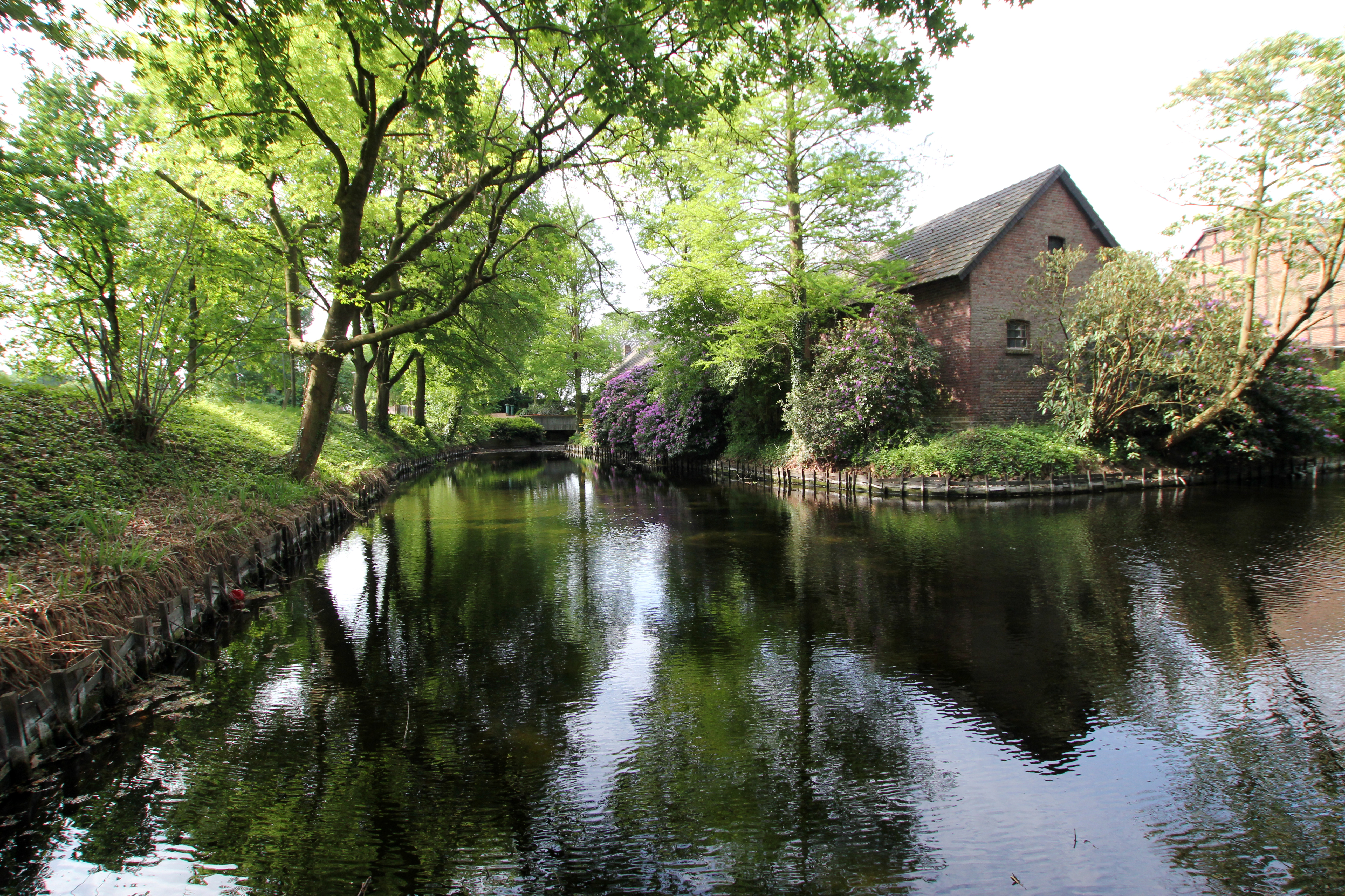 Köln-Junkersdorf Stüttgenweg, Stüttgenhof